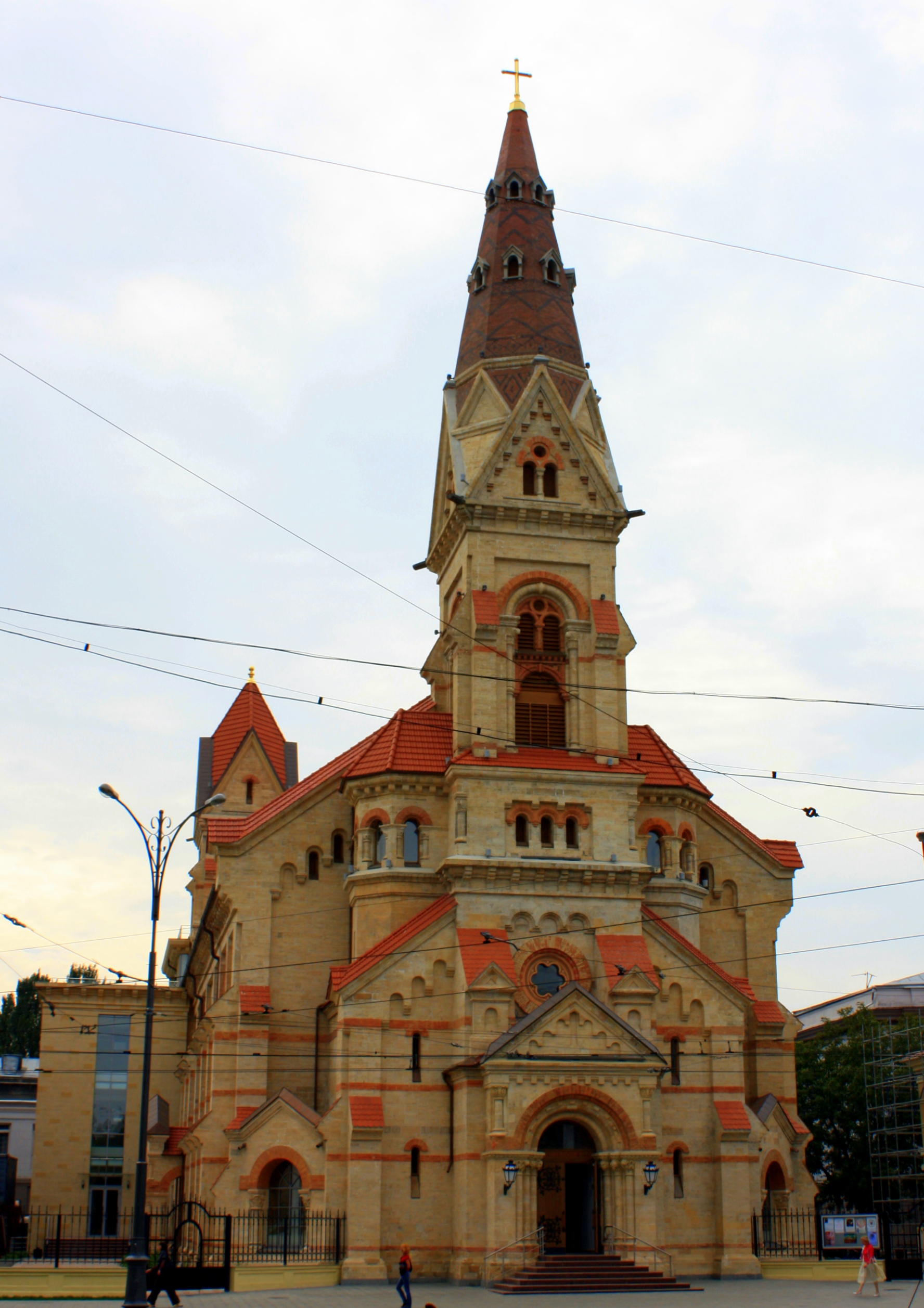 Одеська лютеранська кірха